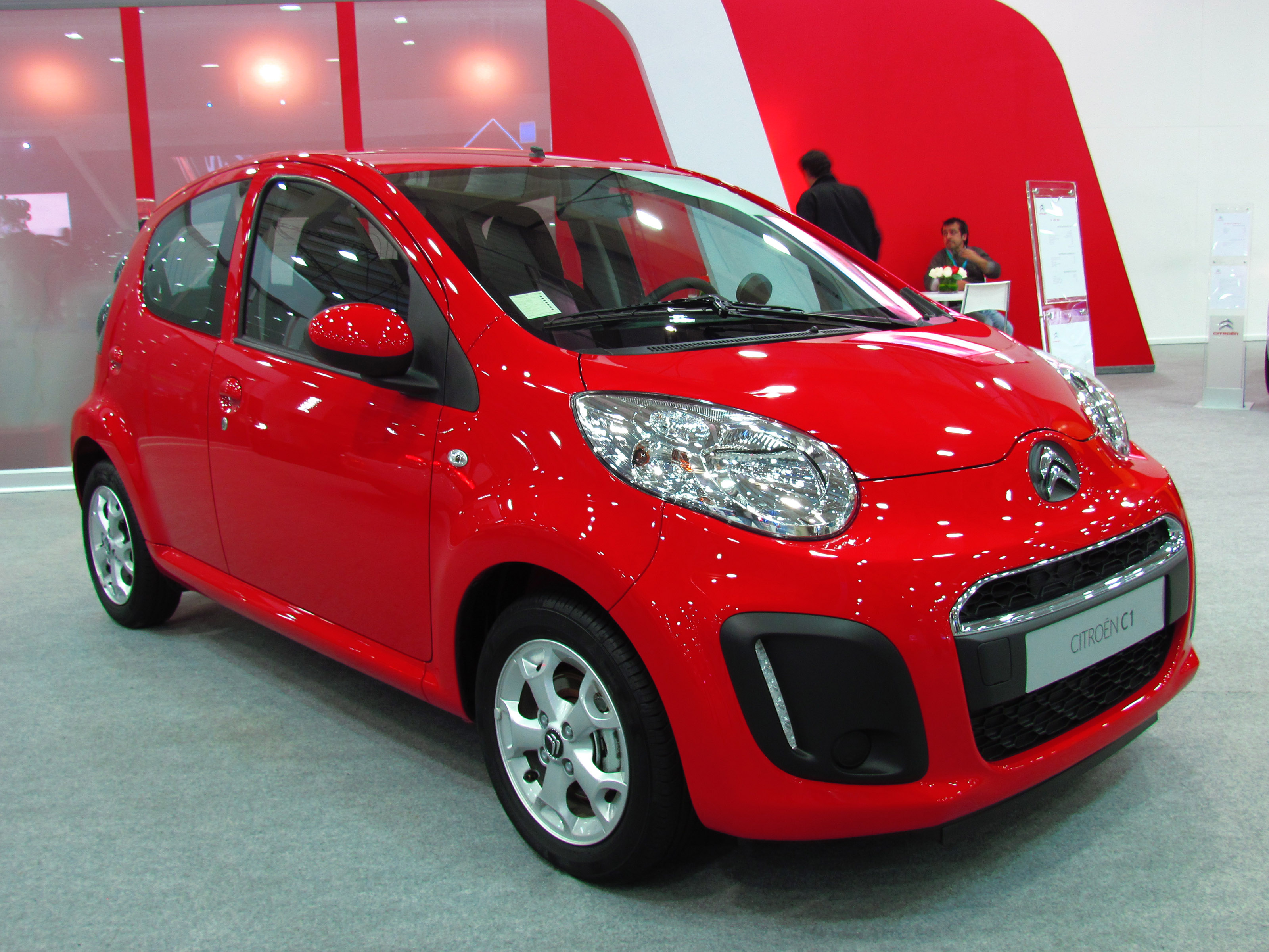 Citroen C1 1.0i 2013